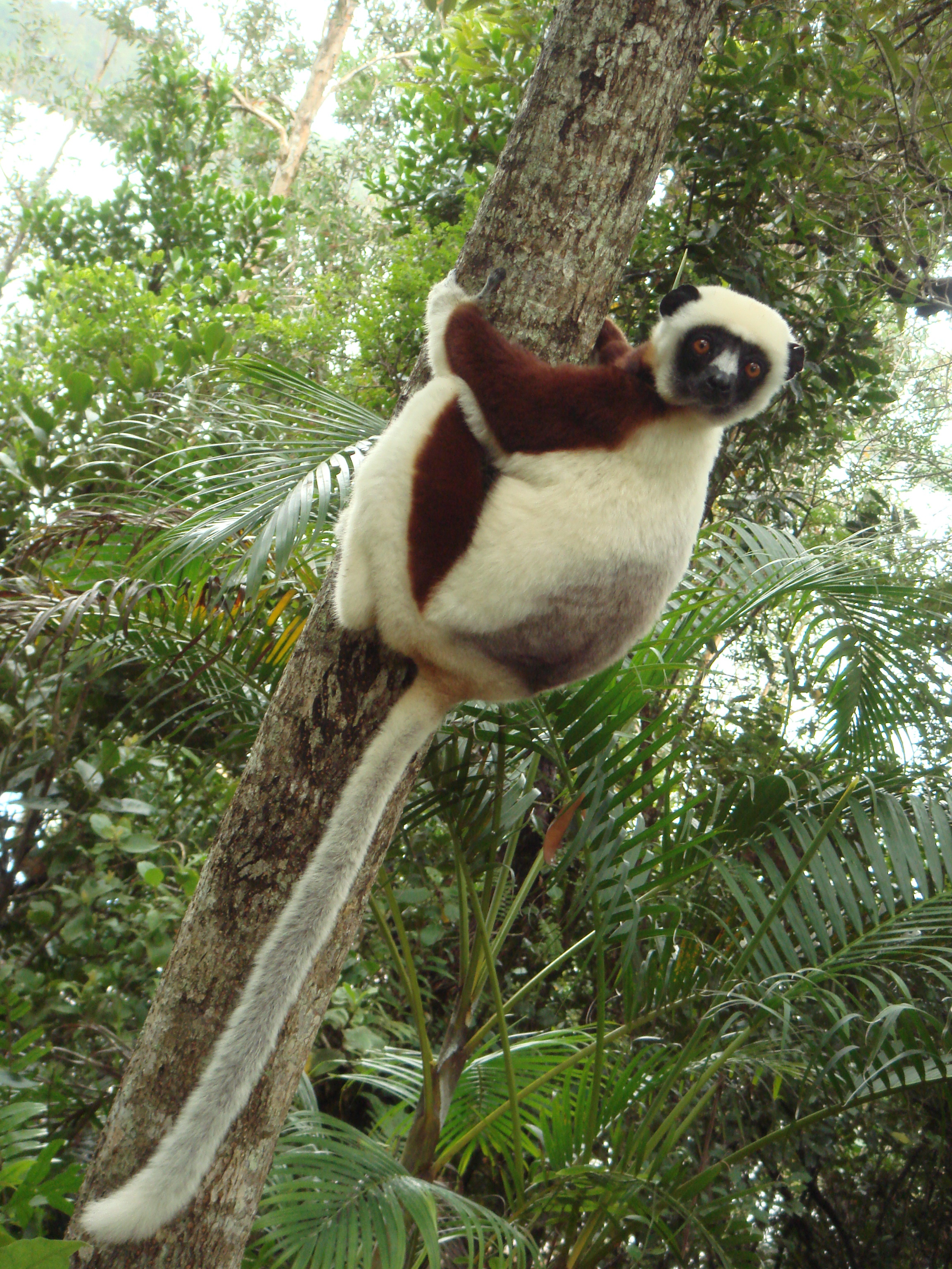 Propithecus coquereli (Coquerel's Sifaka)